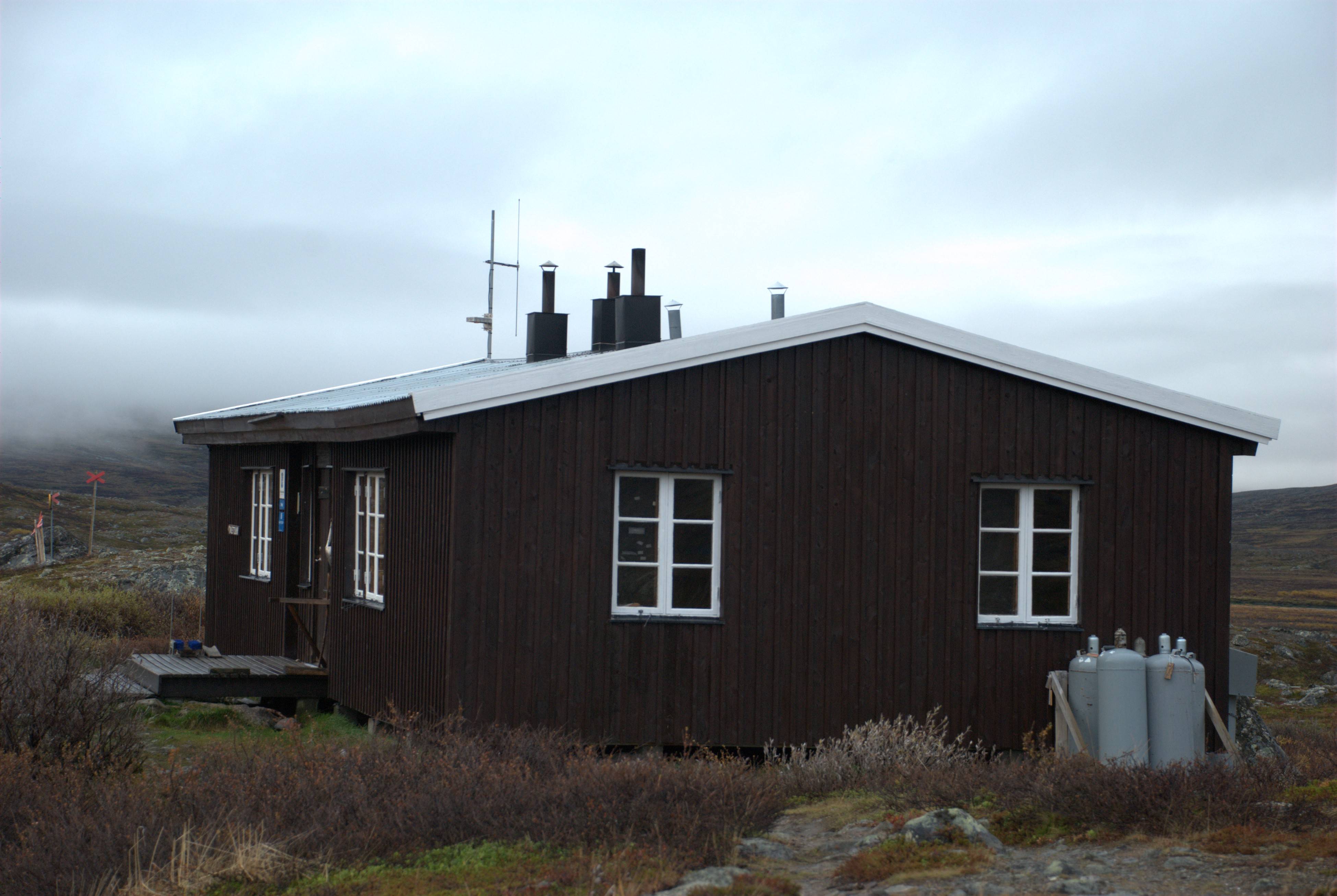 Singistugan